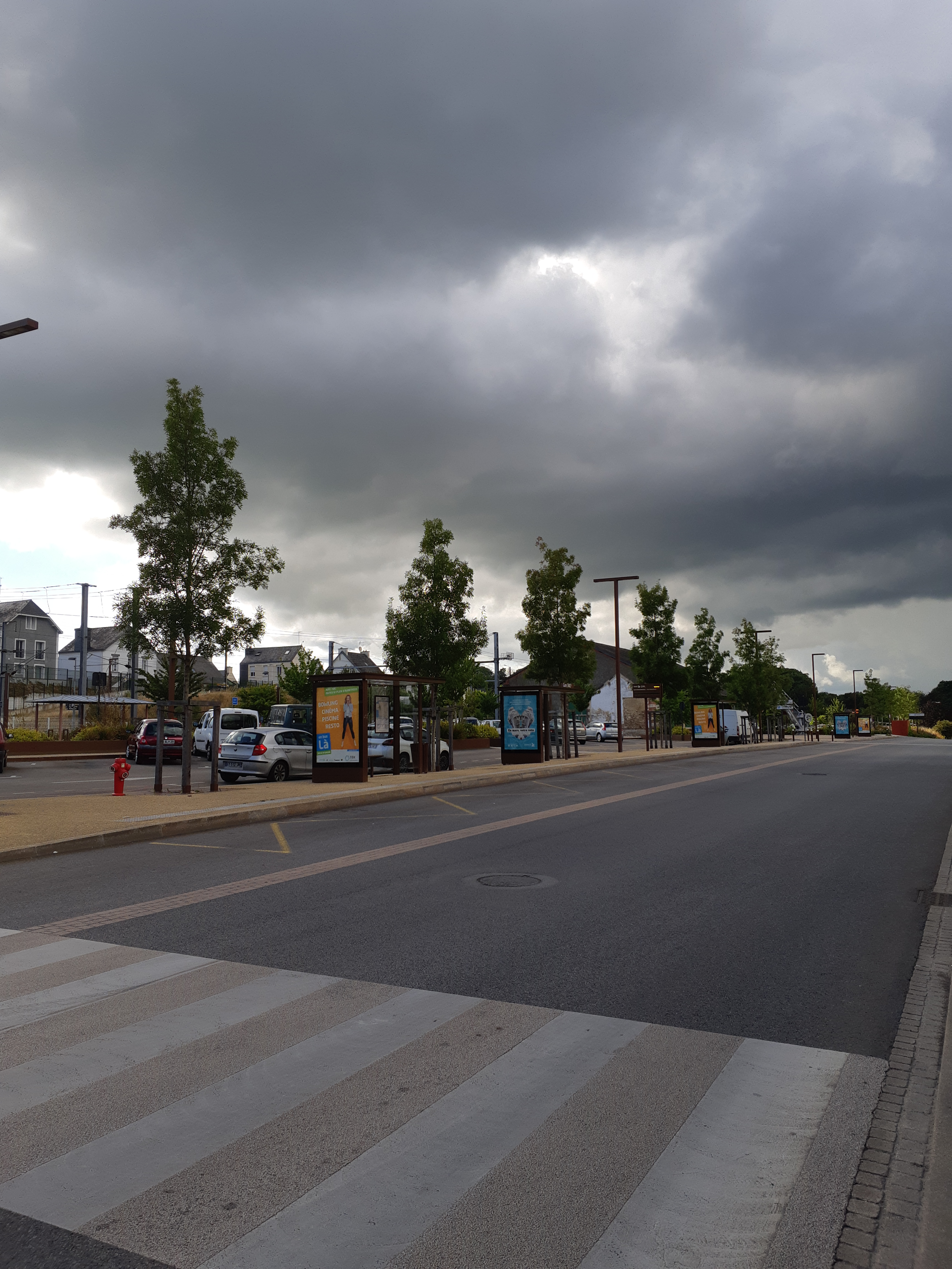 Le point d'échange multimodal de Quimperlé du côté de la gare de marchandises avec les quais de bus intercommunal au centre.